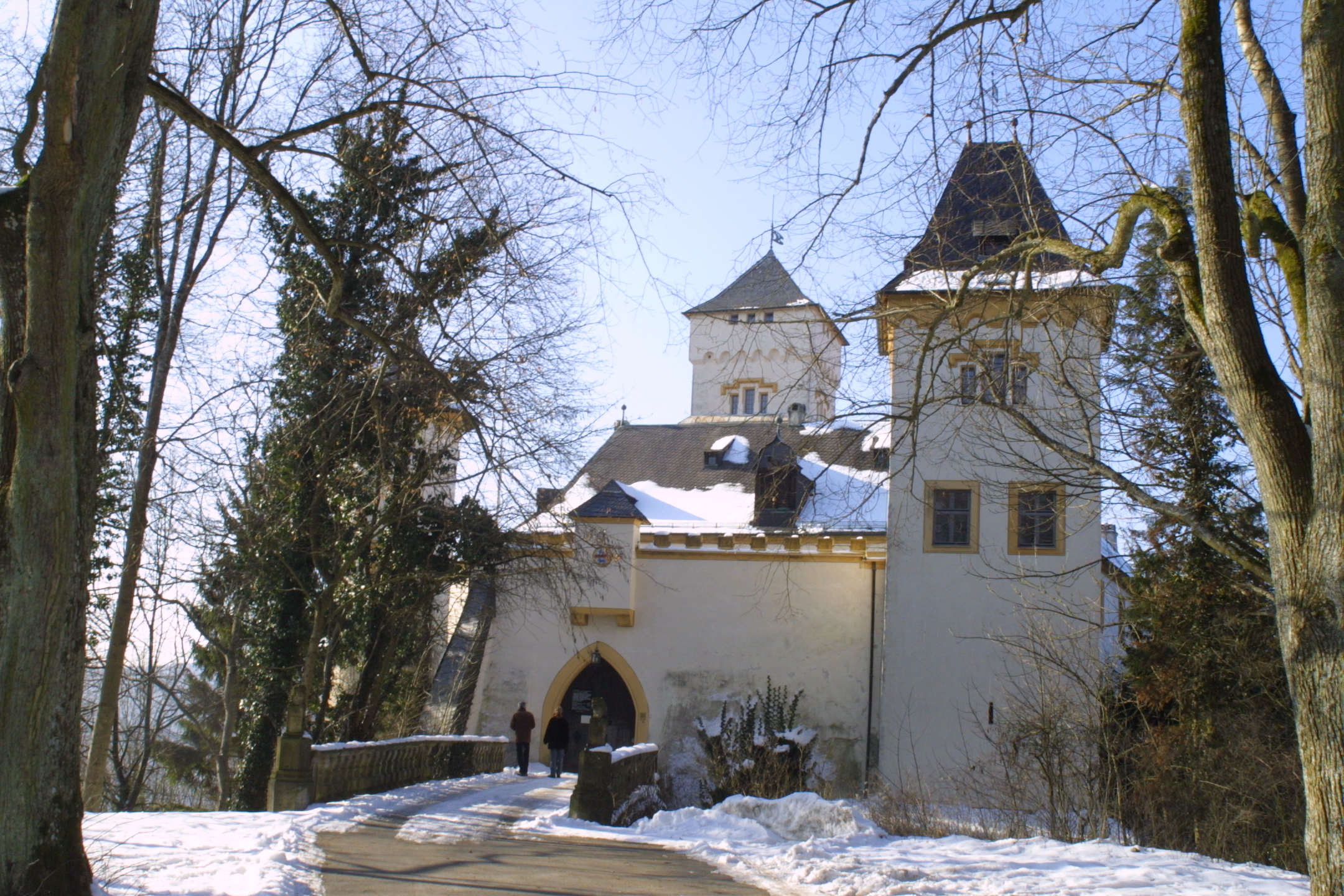 castle Greifenstein near Heiligenstadt (Franconia)